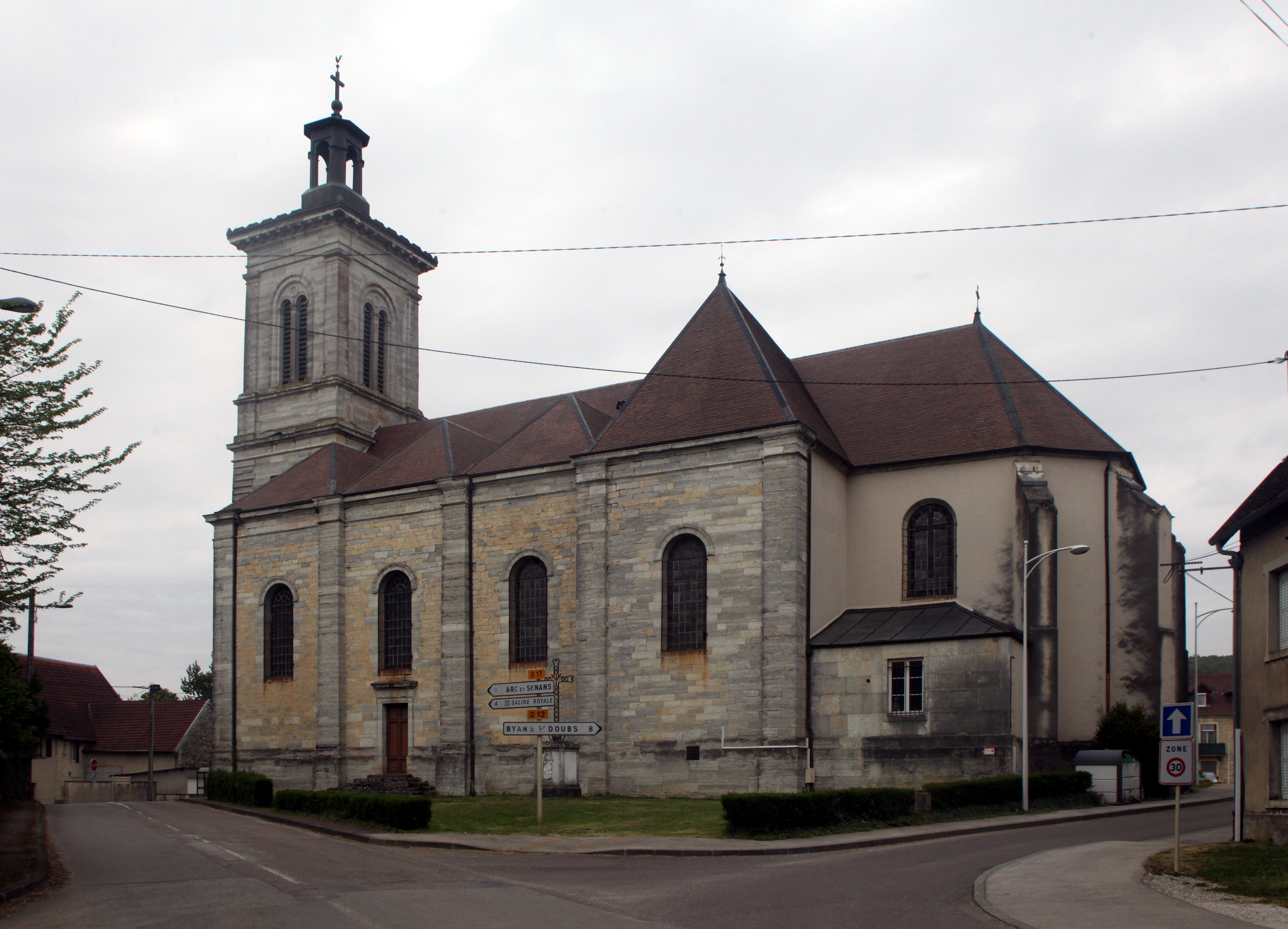 Église de Liesle (Doubs).